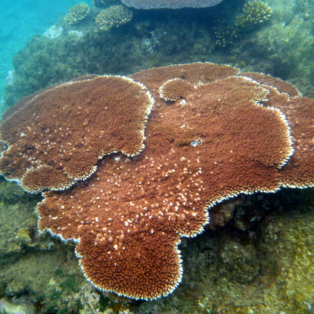 Colonia de Acropora hyacinthus, en isla Normanby, Queensland, Australia